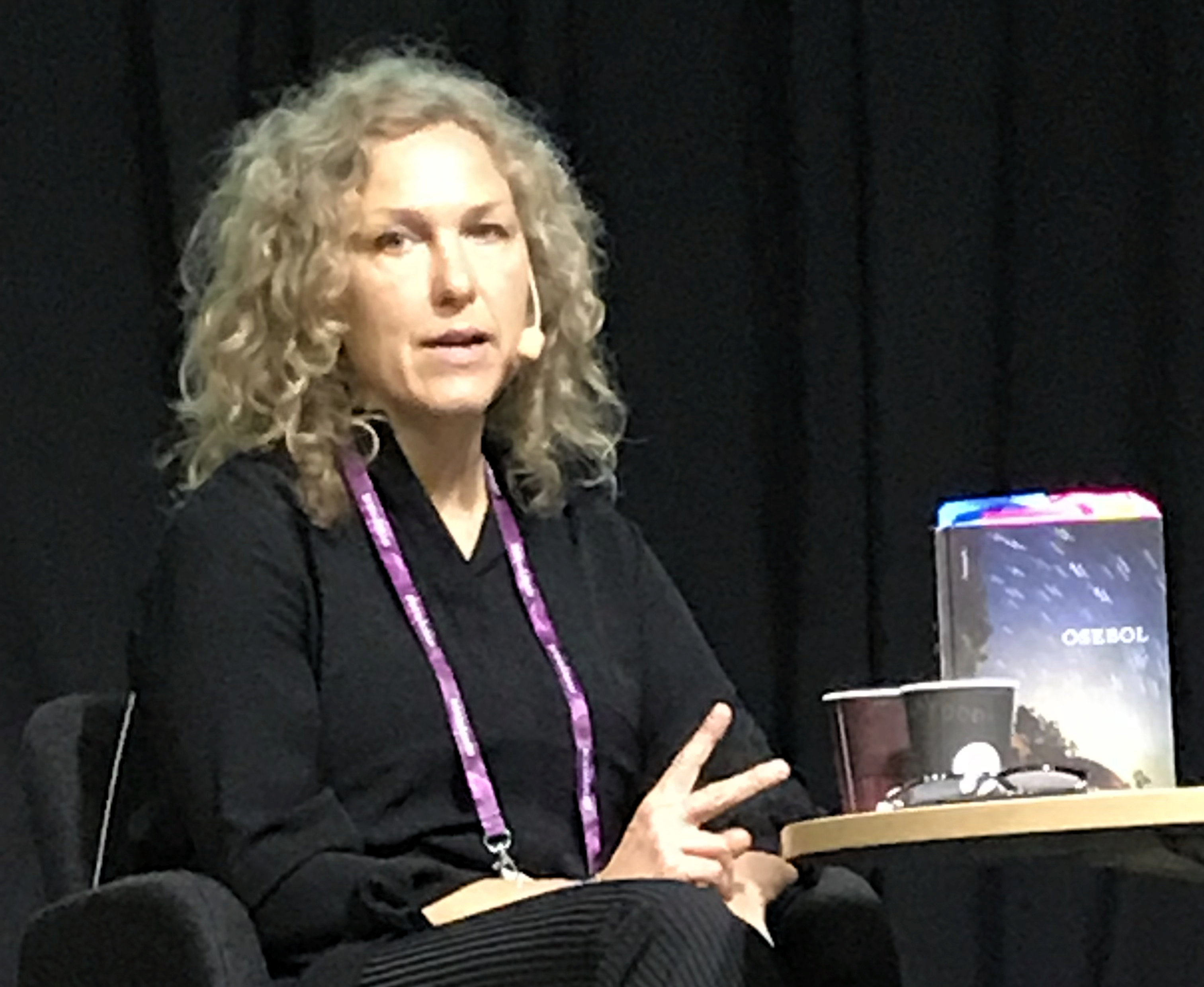 Marit Kapla 2019, på Bokmässan i Göteborg